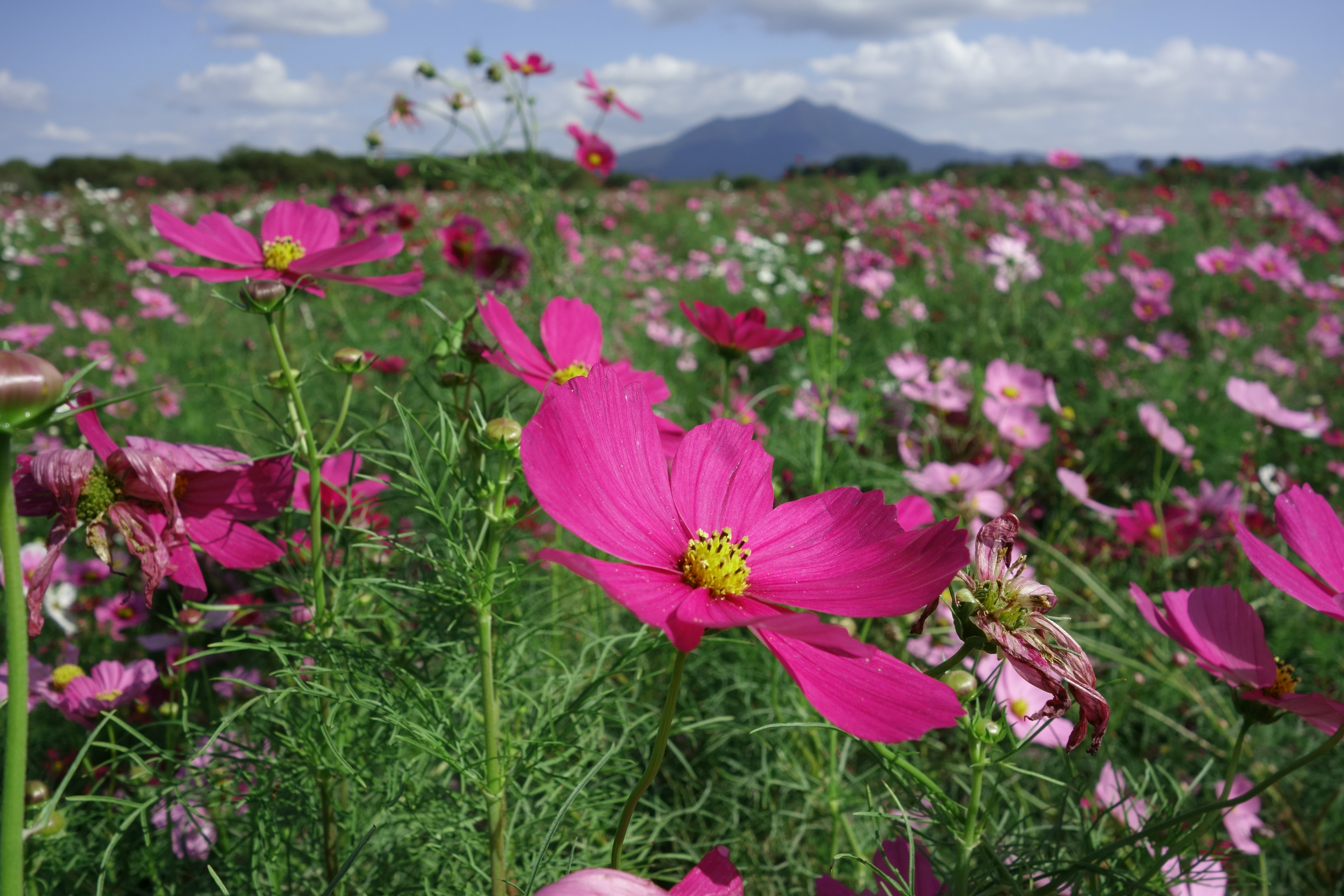 小貝川河川敷のコスモスと筑波山